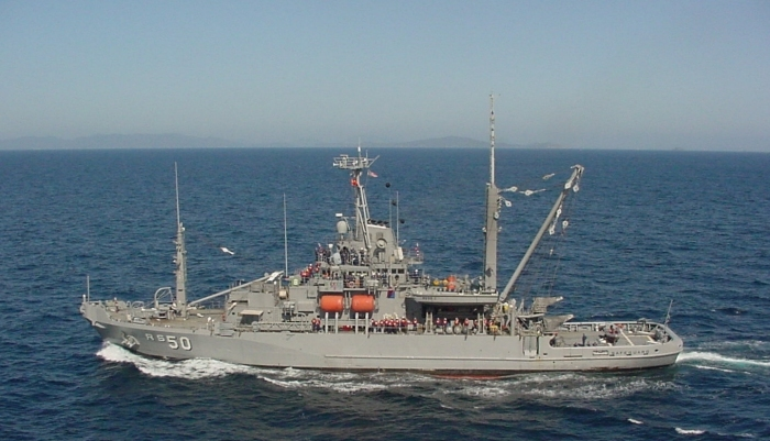 USS Safeguard (ARS-50)